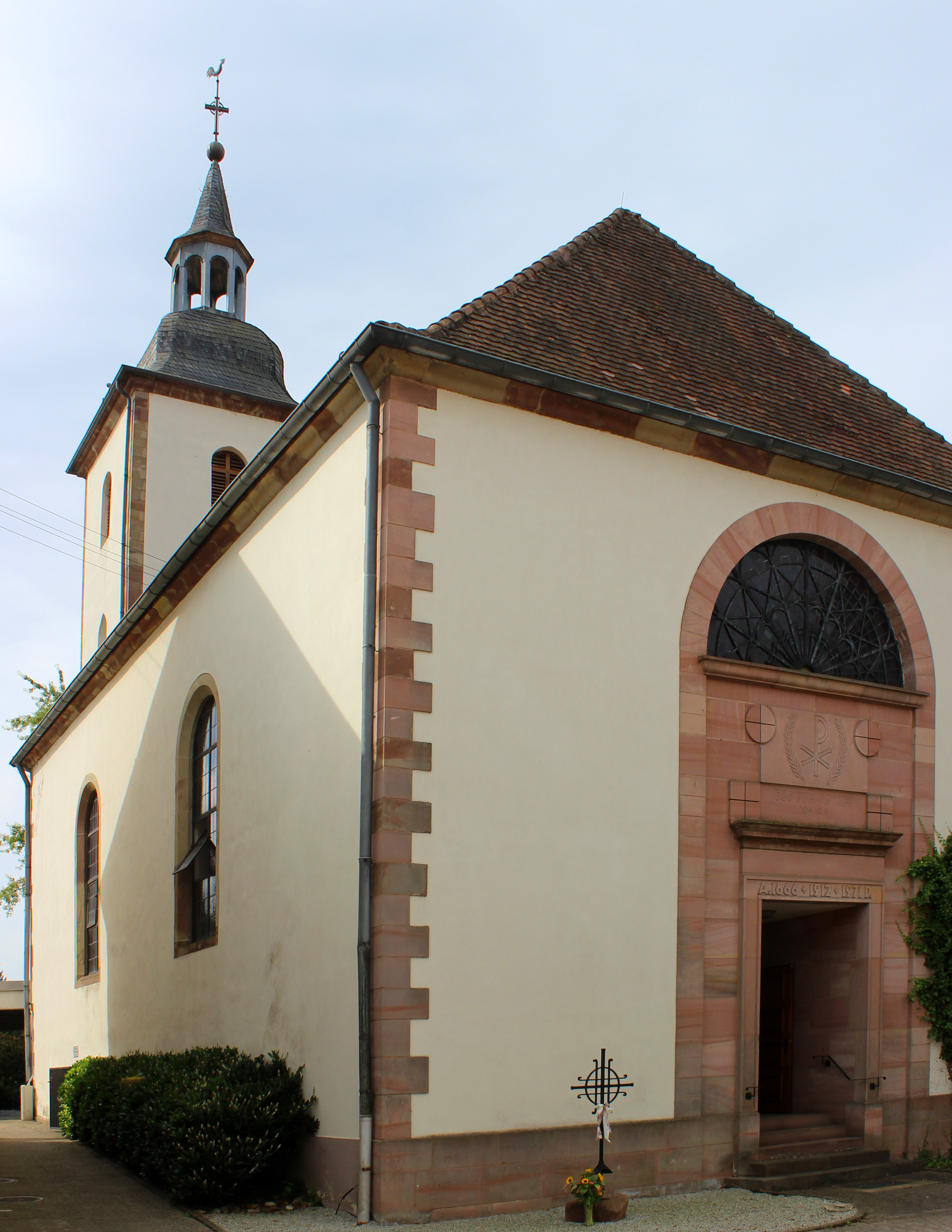 Ehemalige Kirche St. Petrus in Ketten, Bliesmengen-Bolchen, Gemeinde Mandelbachtal, Saarpfalz-Kreis, Saarland